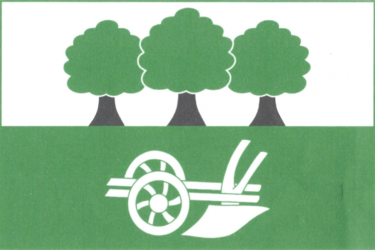 vlajka, Očelice, okres Rychnov nad Kněžnou